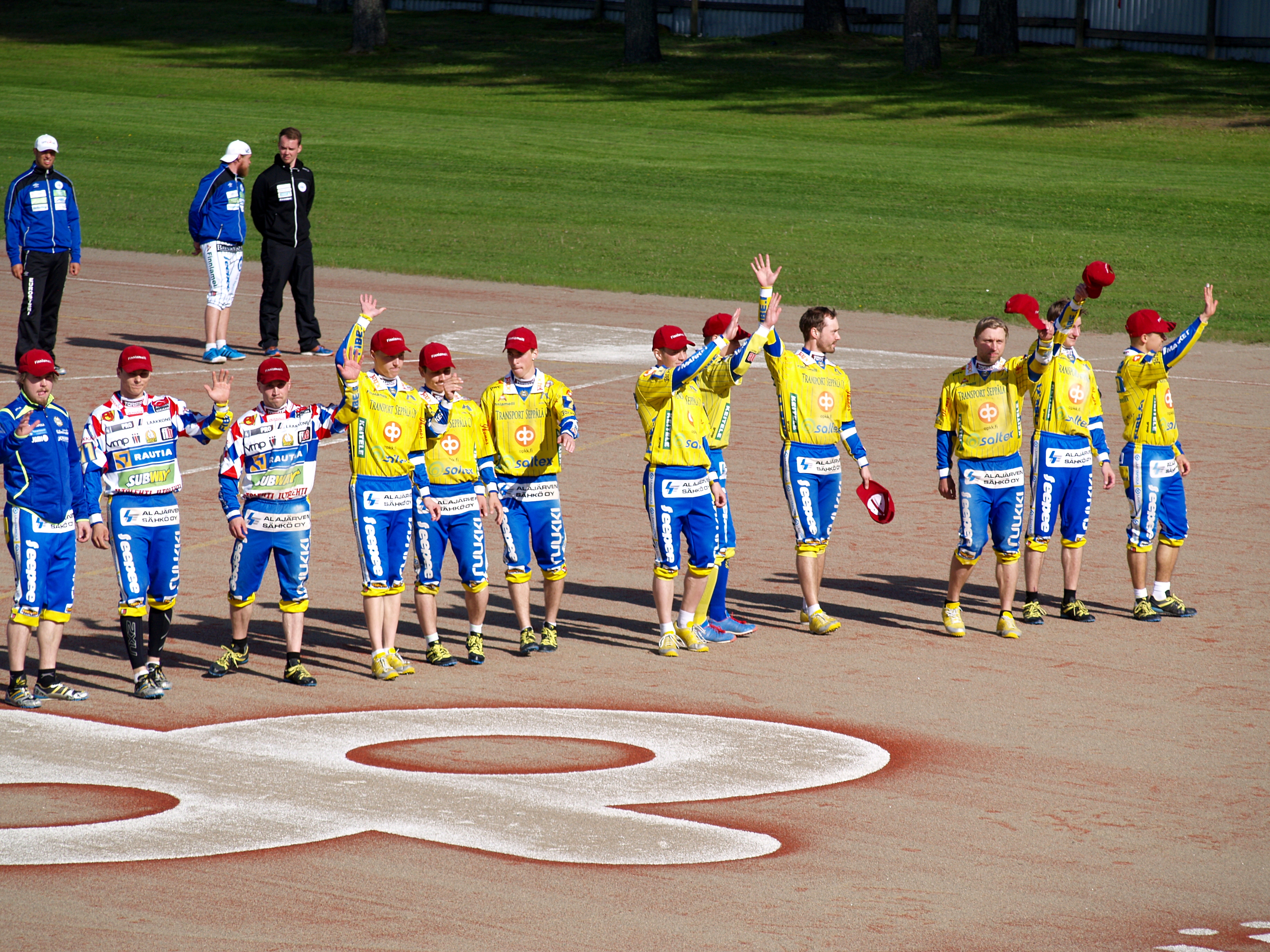 Alajärven Ankkurit - Vimpelin Veto pesäpallo-ottelu 23.6.2015.